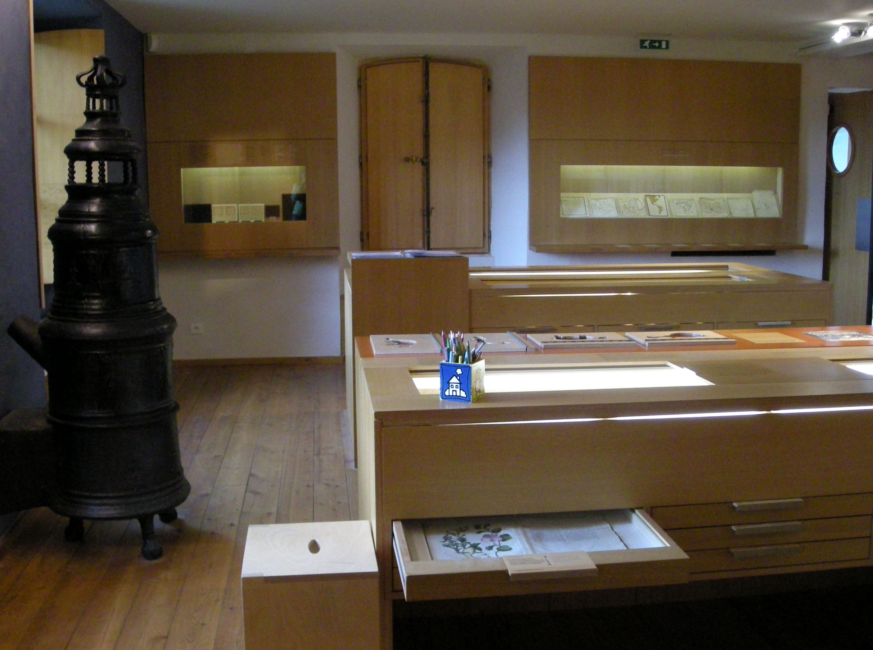 Le vieux poêle dans une salle du Musée Jean-Frédéric Oberlin à Waldersbach (Bas-Rhin).